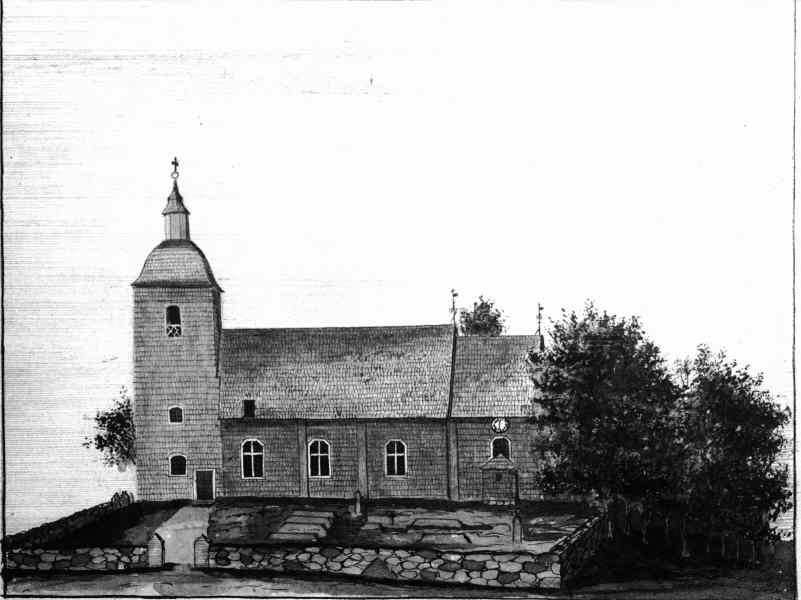 Burseryds kyrka